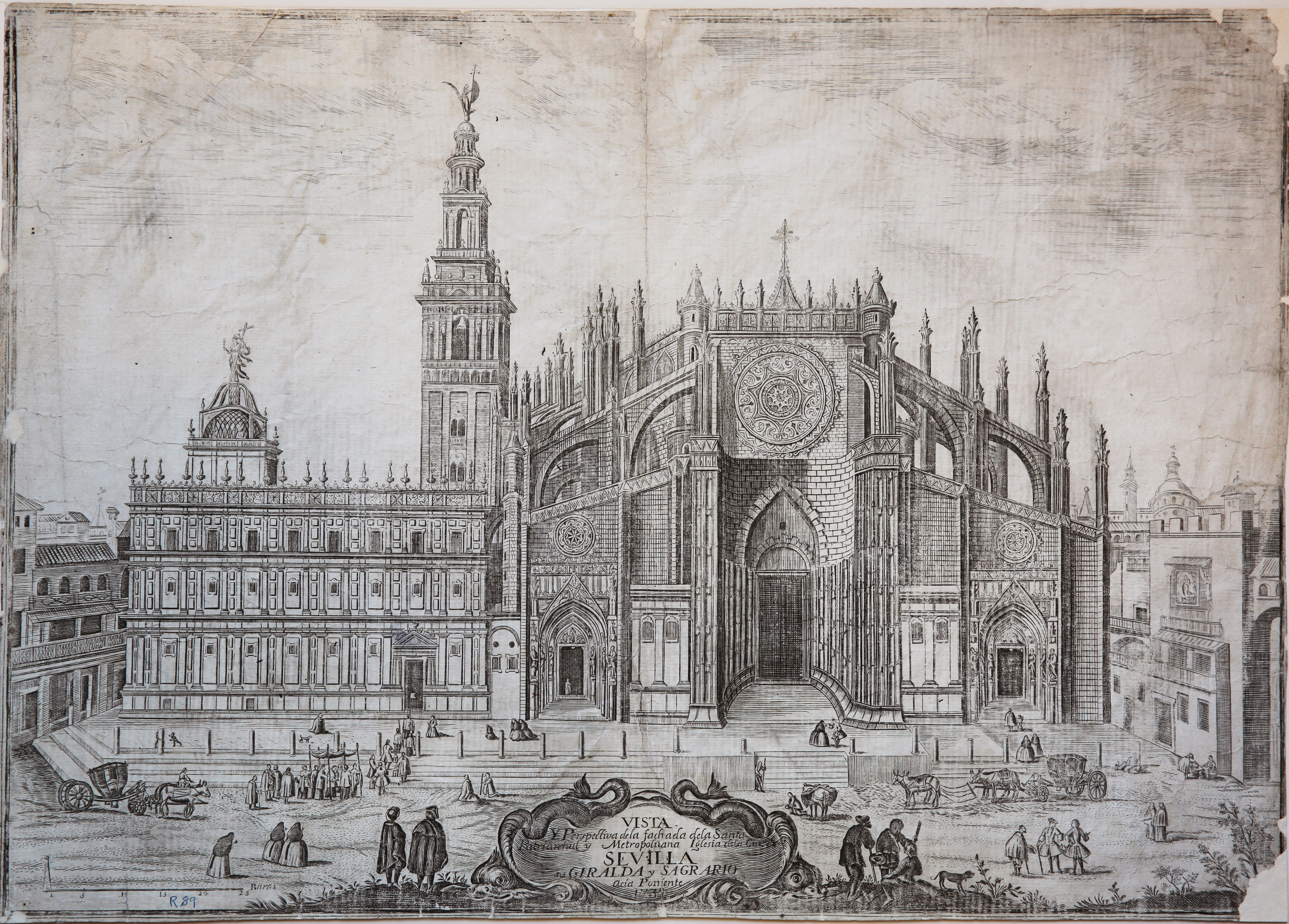 Vista y perspectiva de la fachada de la Santa Patriarchal y Metropolitana Iglesia de la Ciud. de Sevilla, su Giralda y Sagrario acia Poniente 1738